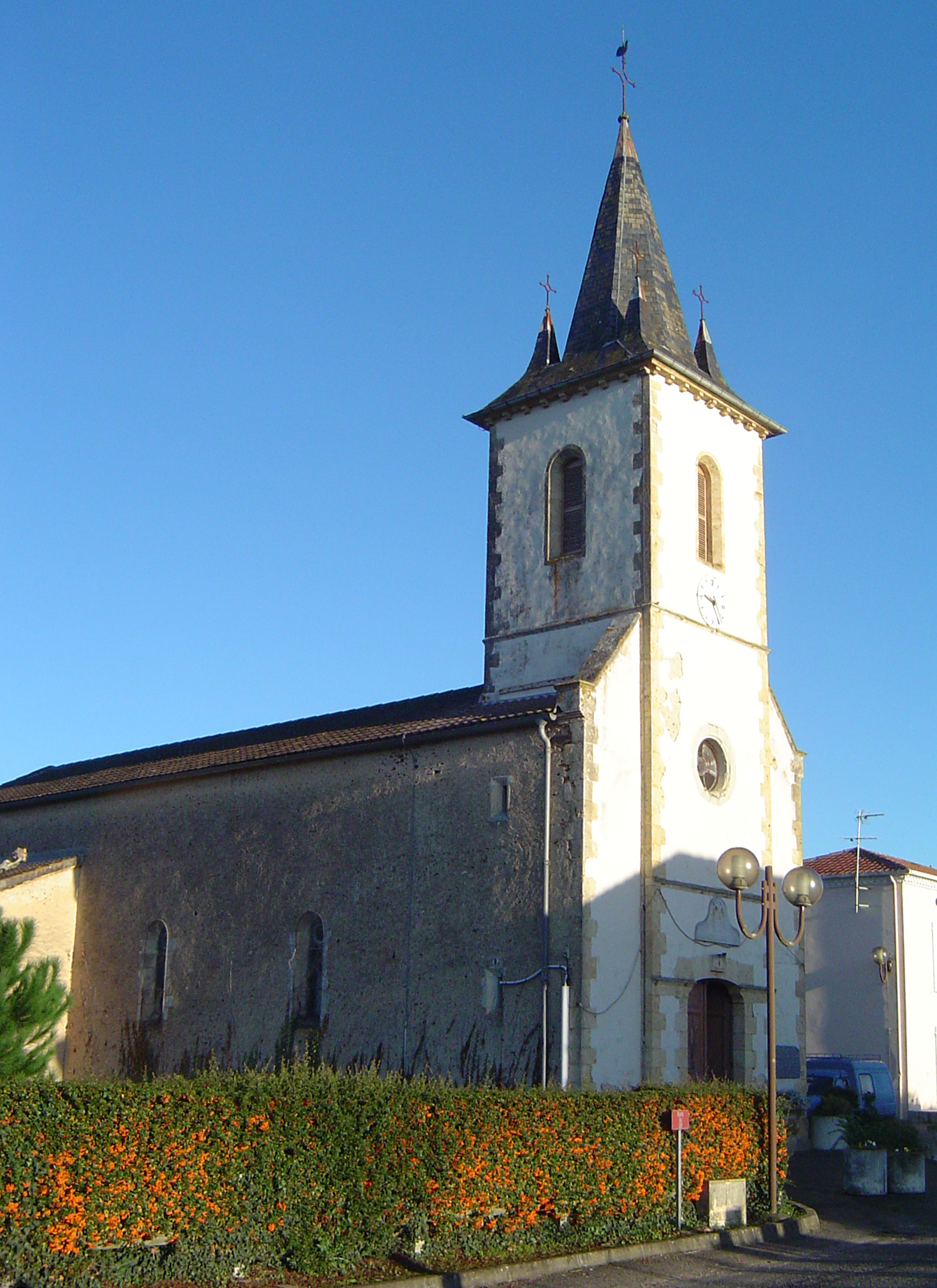 Eglise de Labastide-Chalosse, Landes, FranceOccitan : Glèisa de La Bastida de Shalòssa ; Gasconha